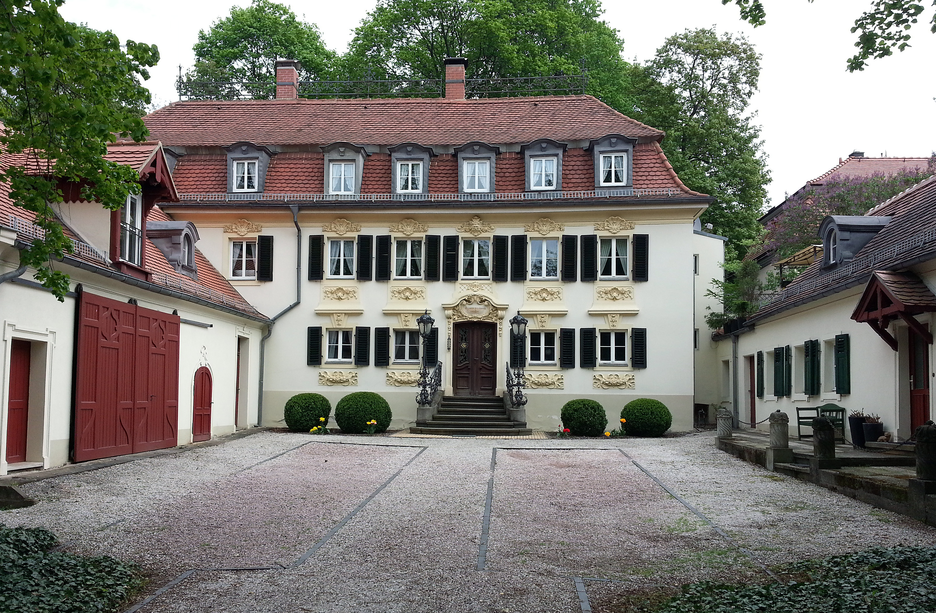 Spieglersches Haus in Dresden-Trachenberge